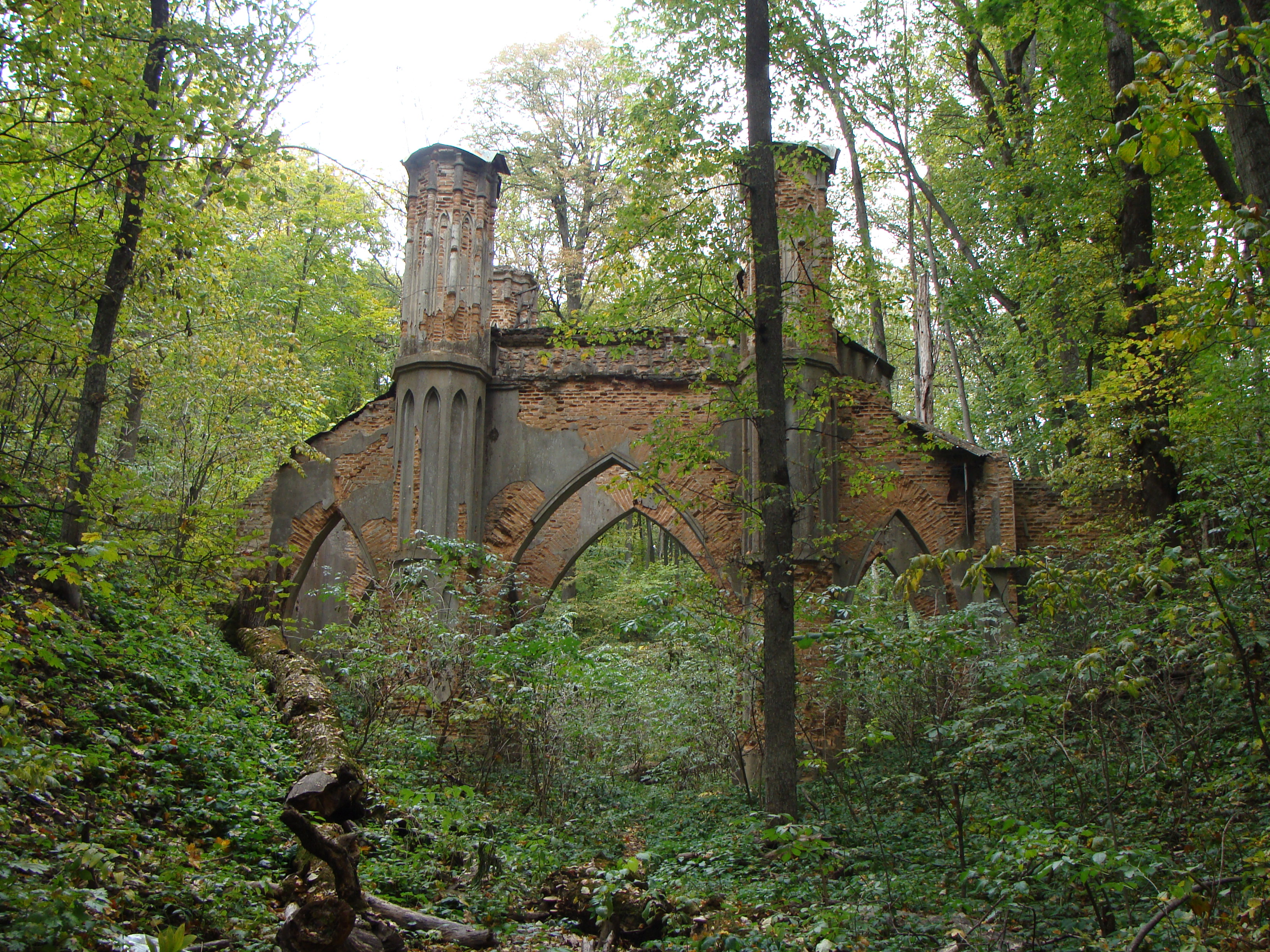 Мiсток (мур.), Сокиринцi